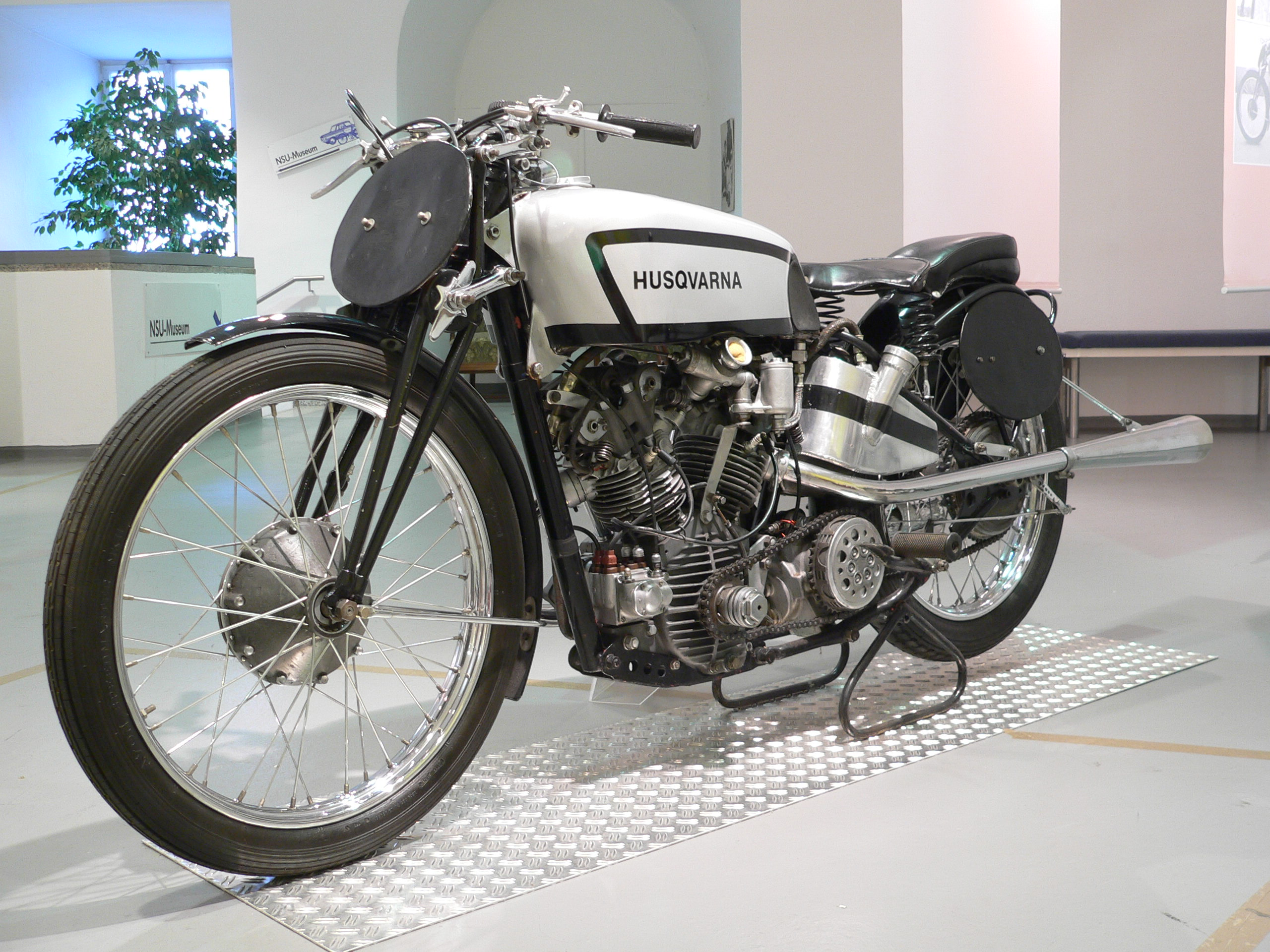 racingbike "Husqvarna" (1935) at the Deutsches Zweirad- und NSU-Museum (496 cm³, Zweizylinder-V-Motor, 41 PS bei 6.700 U/min, 190 km/h)